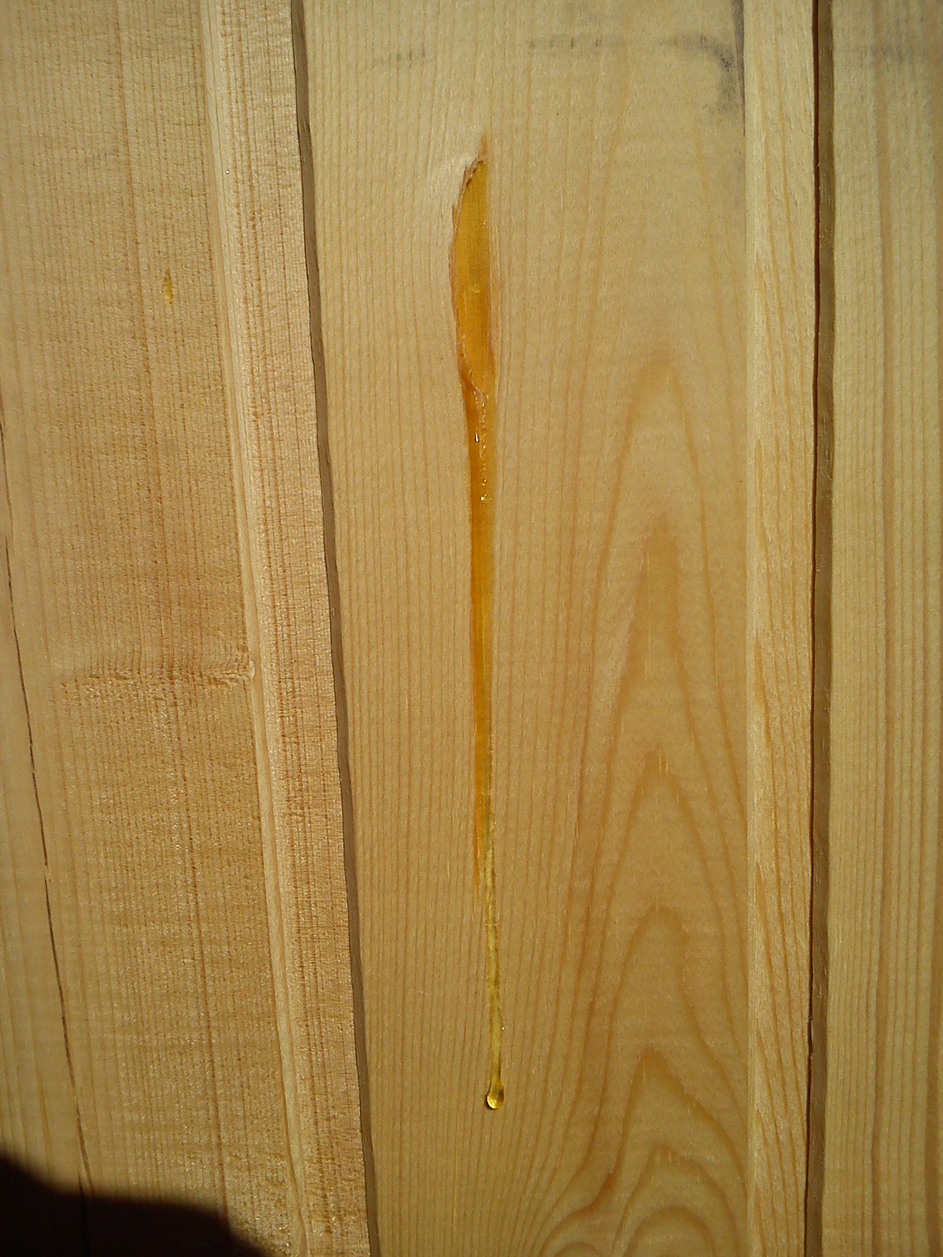 Смола, вытекаящая из смоляных карманов новых досок.